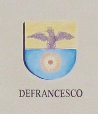 Cognomi storici dei Vicini che discendono dalle famiglie della Regola che abitavano a Predazzo e riguardano 19 cognomi: Boninsegna, Bonora, Bosin, Brigadoi, Defrancesco, Degaudenz, Dellagiacoma, Dellantonio, Dellasega, Demartin, Dezulian, Felicetti, Gabrielli, Giacomelli, Guadagnini, Morandini, Nicolao, Piazzi e Zanna.